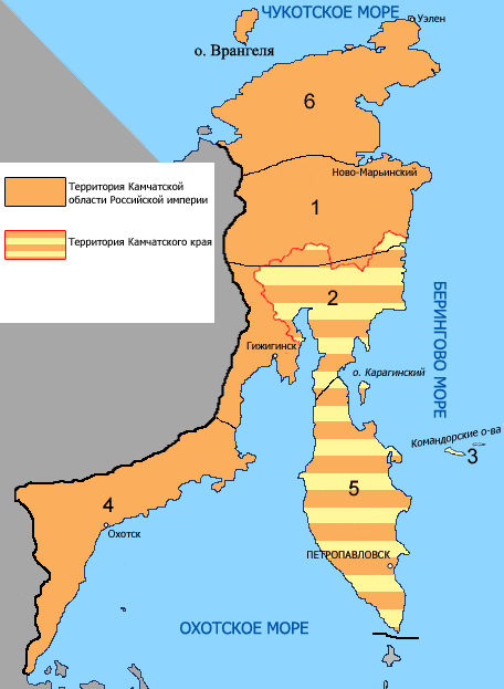 Карта территории Камчатской области Российской империи к 1914 году (с атласа Азиатской части России 1914 года)